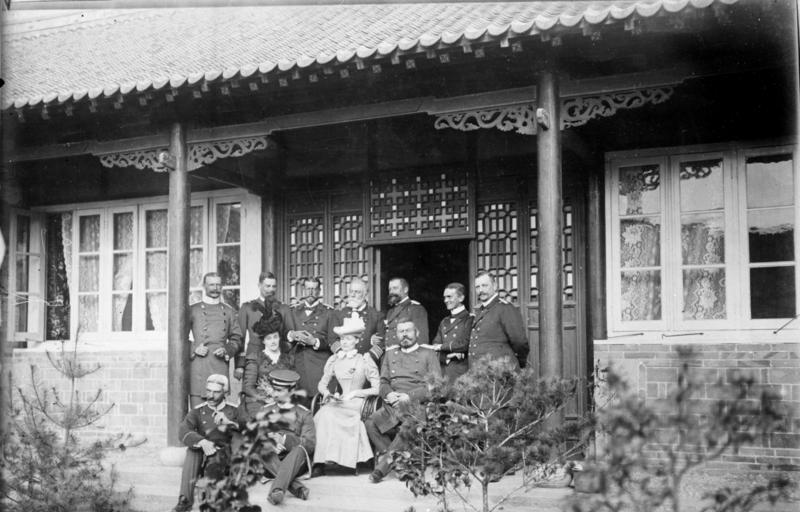 Schutztruppe Kiautschou Tsingtau 1899: Prinz Heinrich im Ostlager vor der Offz.-Messe